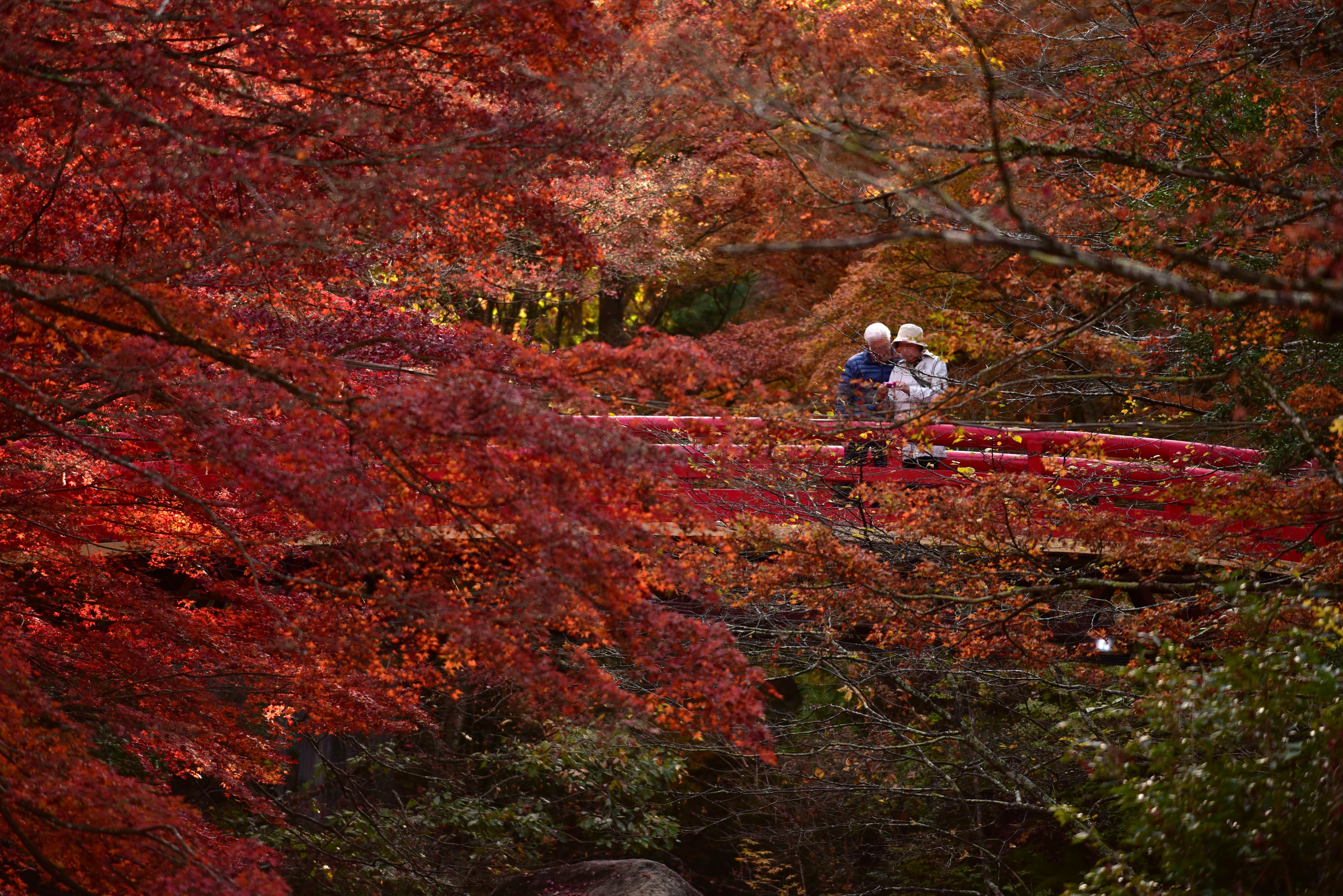 岩屋堂公園の紅葉 Nikon D750